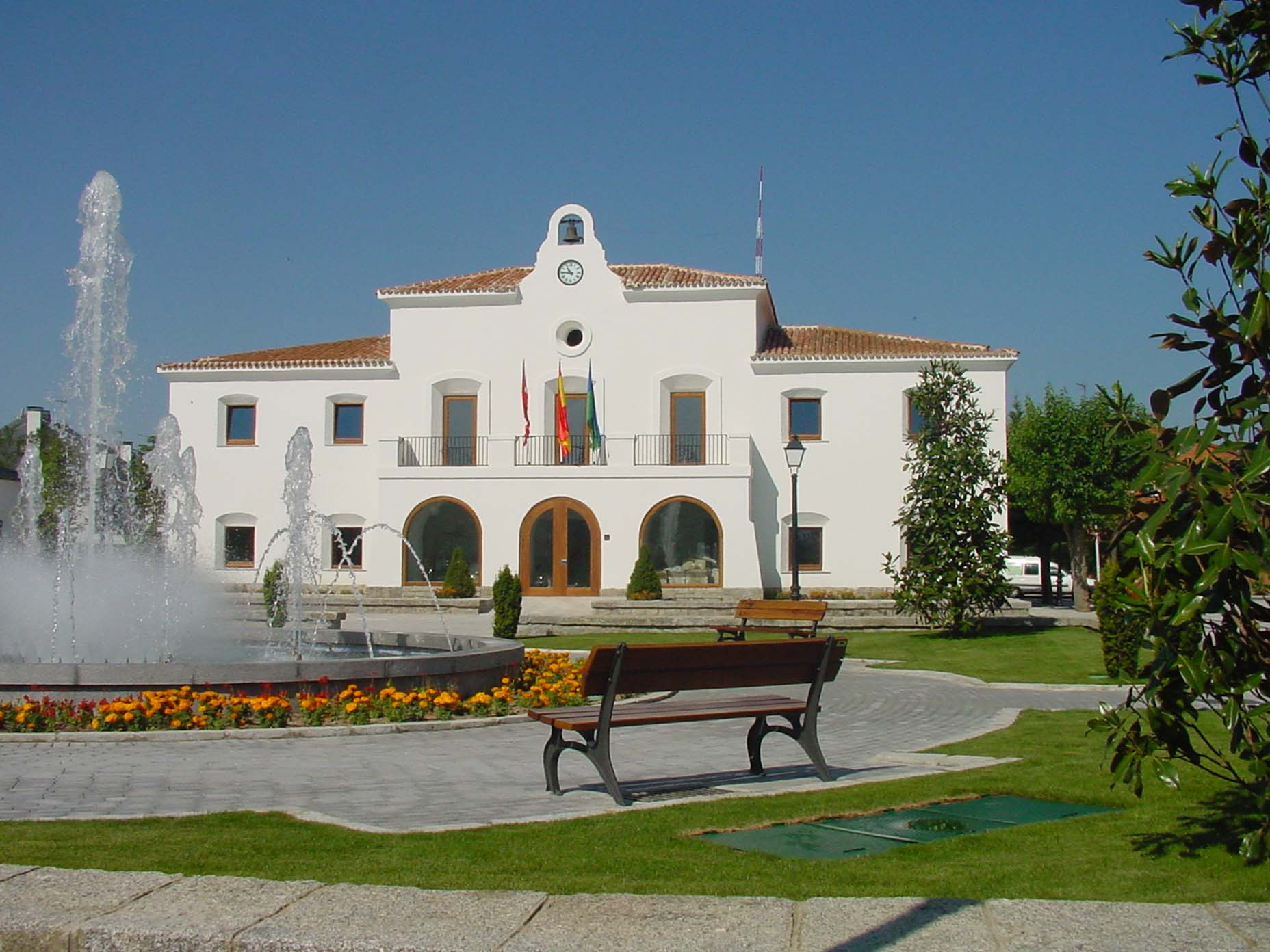 Ayuntamiento de Villanueva de la Cañada.